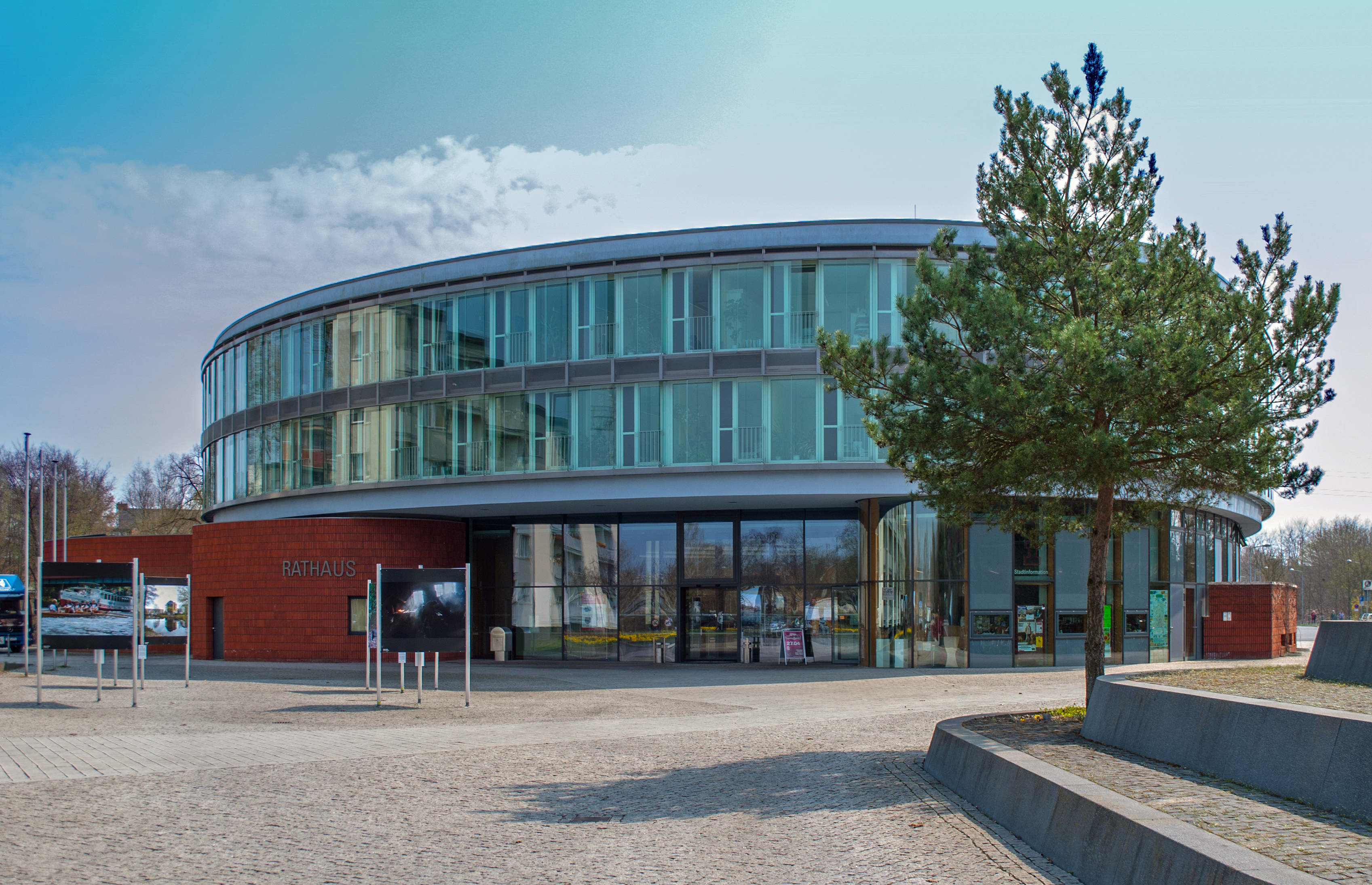 Gebäude und Denkmäler in Hennigsdorf (Oberhavel).